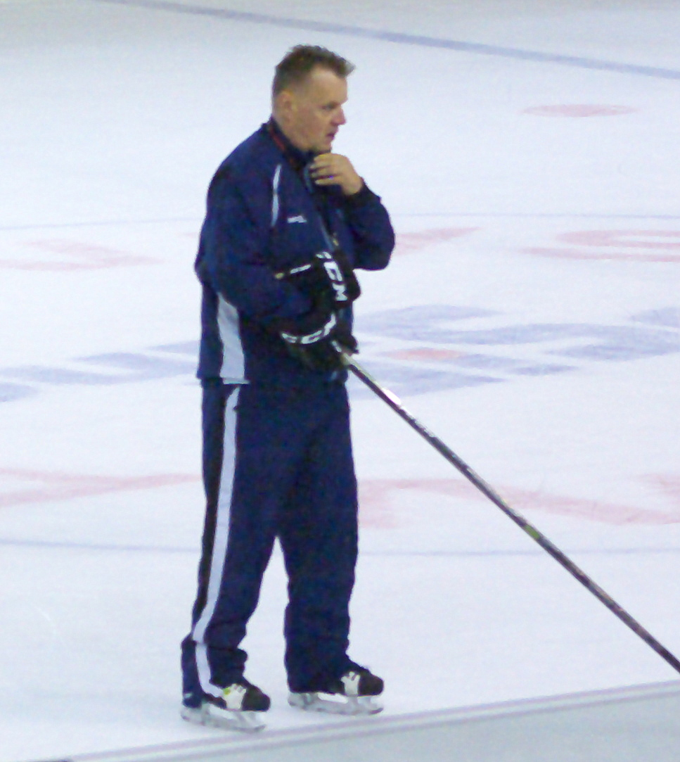 Kari Rauhanen podczas treningu STS Sanok (2015)